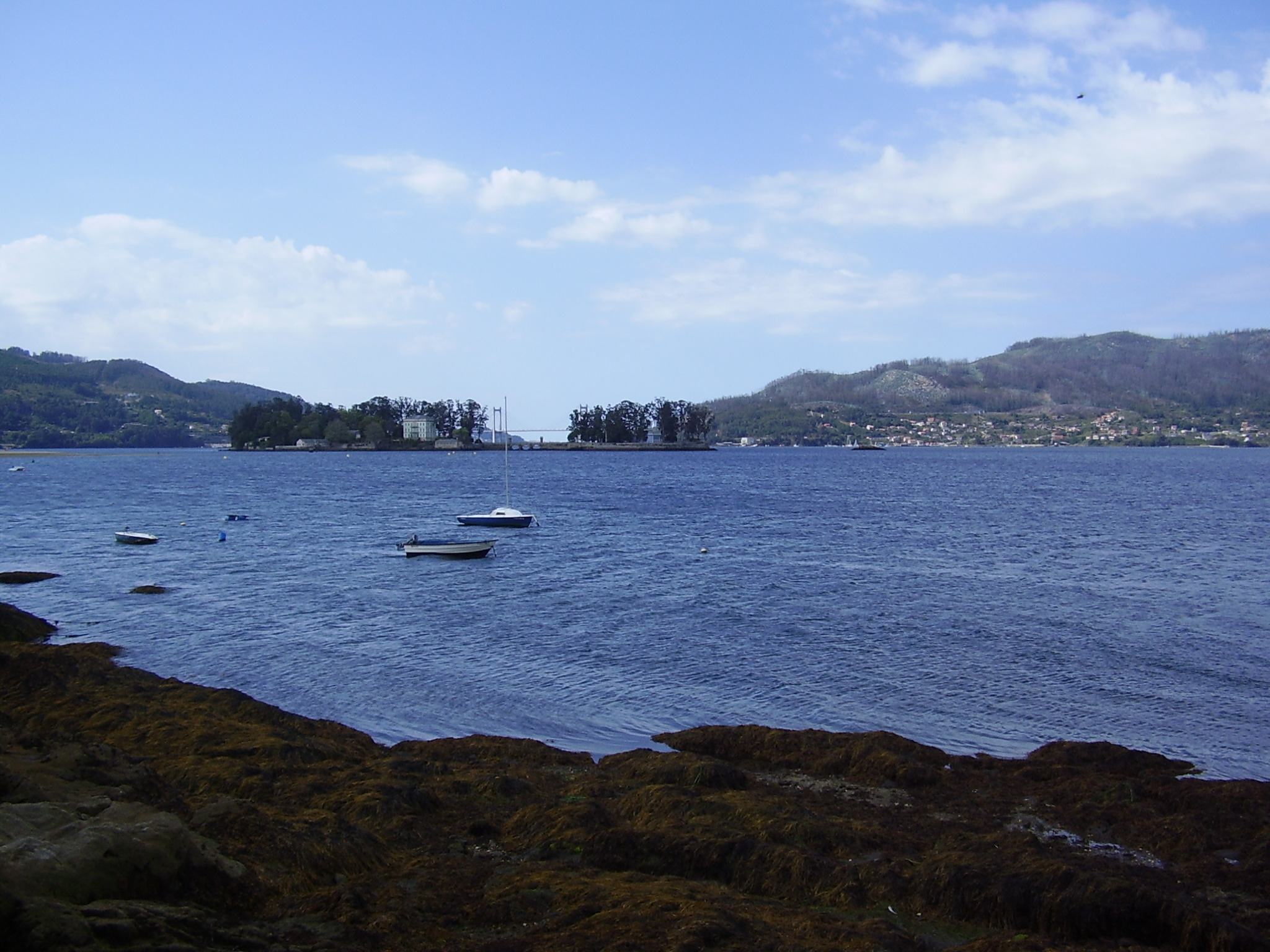 ensada s simon